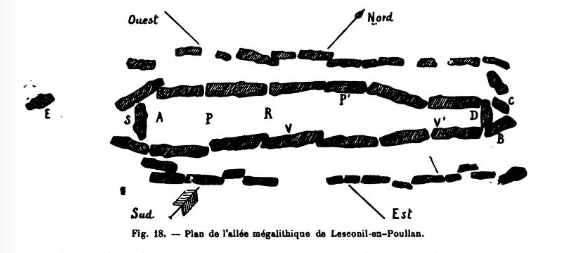 Plan de l'allée mégalithique en pierres arc-boutées de Lesconil-en-Poulan (Finistère), 1895